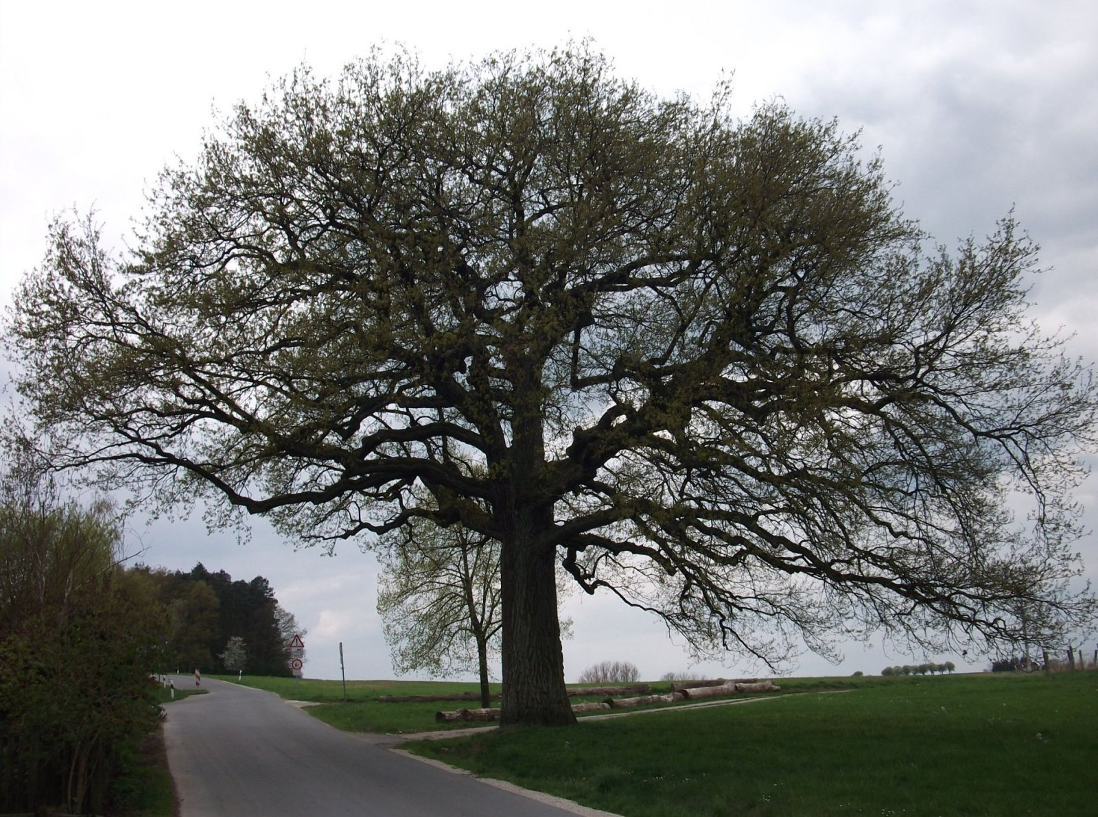 Toteneiche